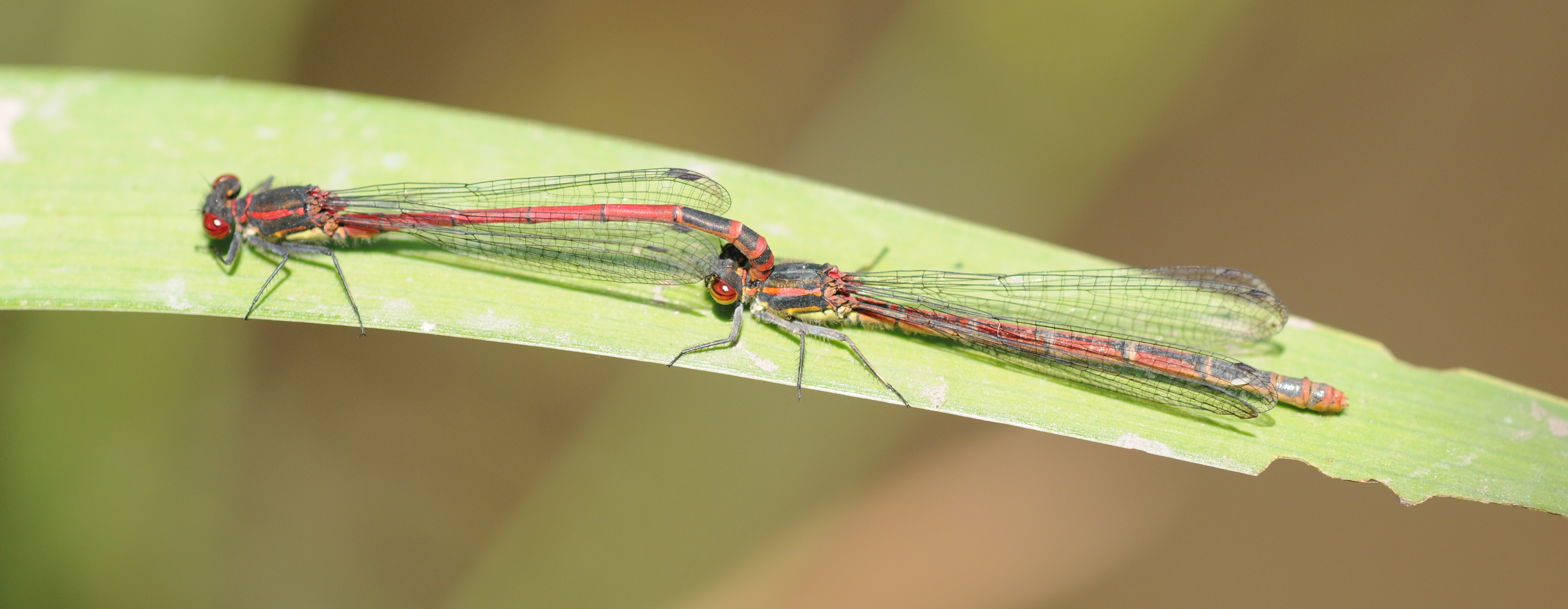 Accouplement de petites nymphe au corps de feu